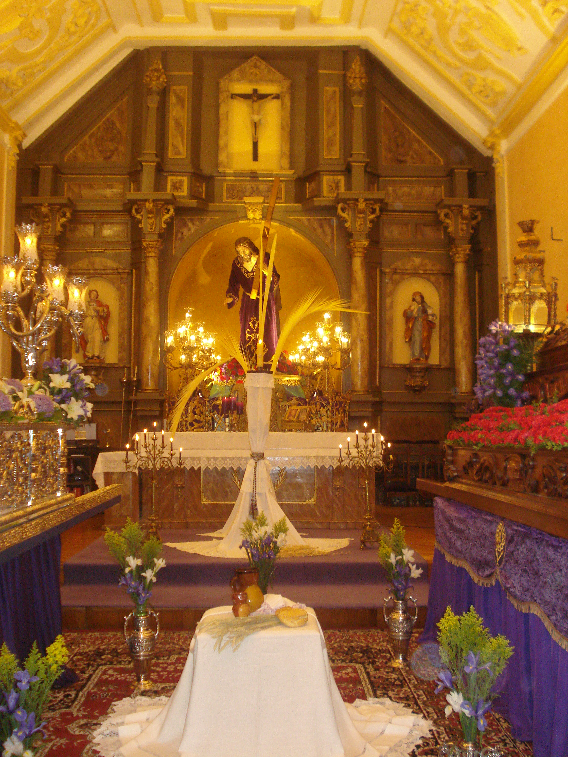 Monumento al Santísimo Sacramento en la Capilla de la Cofradía de Jesús Crucificado.